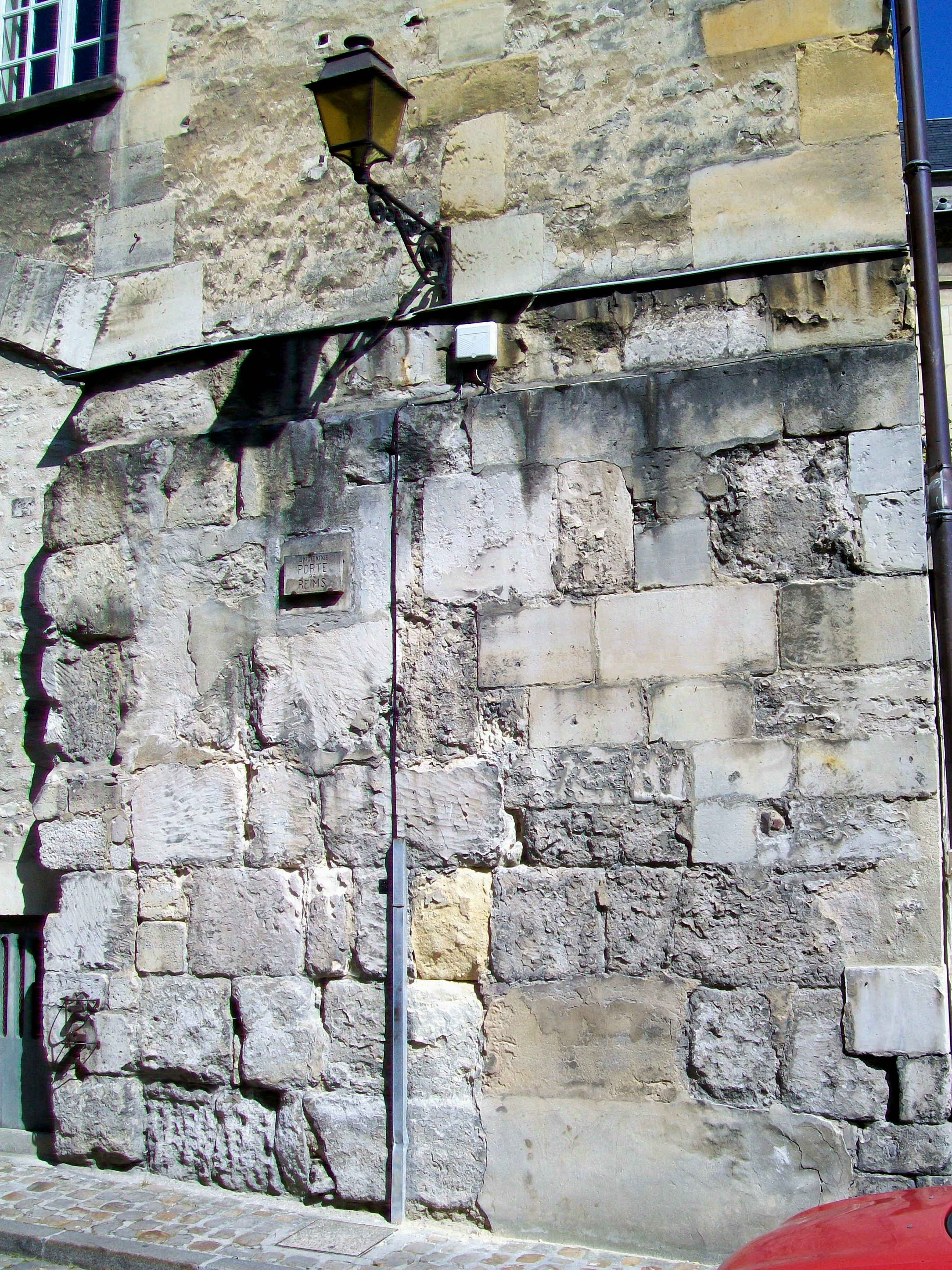 L'ultime vestige de la porte de Rheims (ou porte Bellon) gallo-romaine démolie en 1806 est cette partie de mur à l'extérieur de l'ancien palais épiscopal, rue du chancelier Guérin.